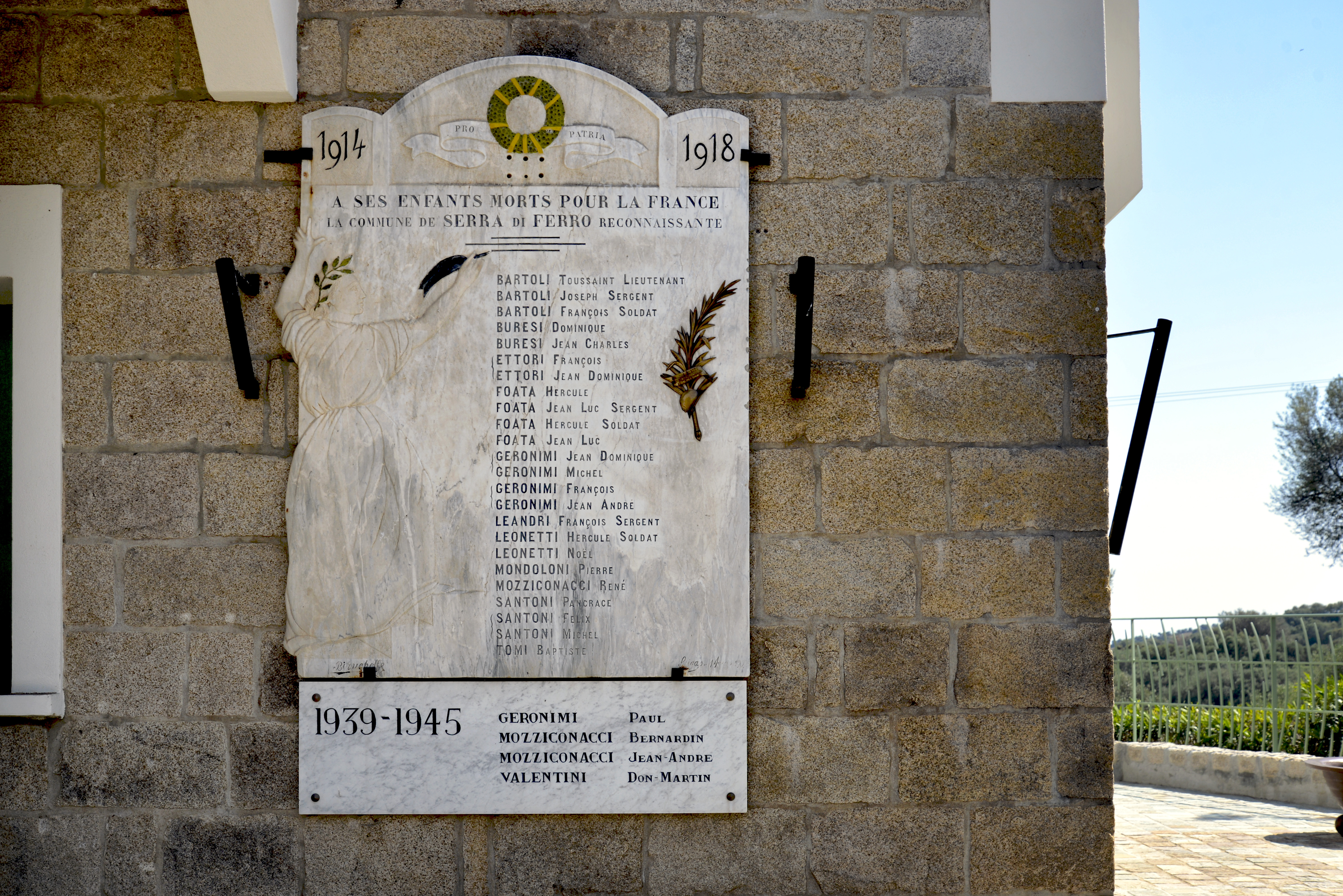 Serra-di-Ferro, Valinco (Corse-du-Sud) - Monument aux morts sur le mur de la mairie